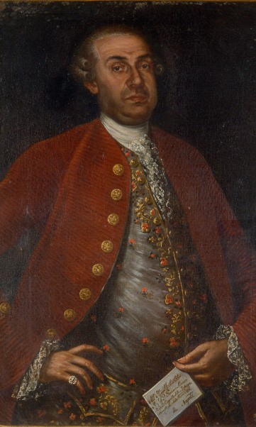 El compositor italianao Gennaro Manna (1715-1779)